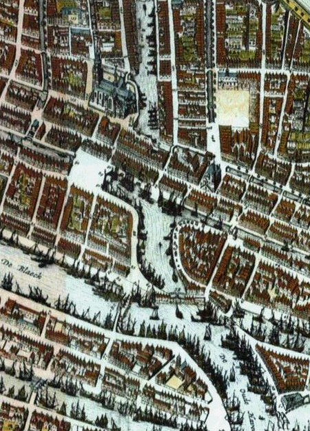 Medieval Rotterdam around the Kolk.